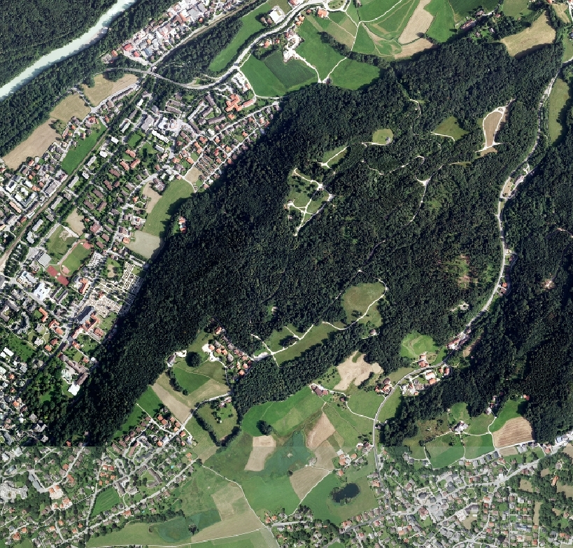 Kirchholz, unbewohntes Waldgebiet und früheres Gemeindefreies Gebiet, heute großteils zu Bayerisch Gmain und im übrigen zu Bad Reichenhall gehörig, im Osten durch das schmale Band des Weilers Leopoldstal (im Tal des Weißbachs) vom österreichischen Waldgebiet um den Randersberg getrennt. Maßstab 1:15000